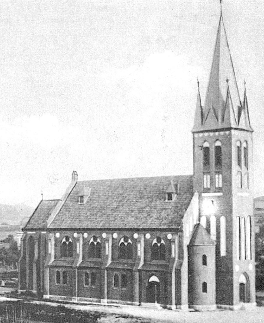 Alfeld, alte katholische Kirche Hl. Herz Mariä, erbaut 1902/03, abgerissen 1969